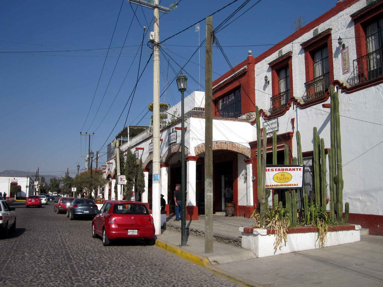 Sentrum av Papalotla i delstaten México i Mexico